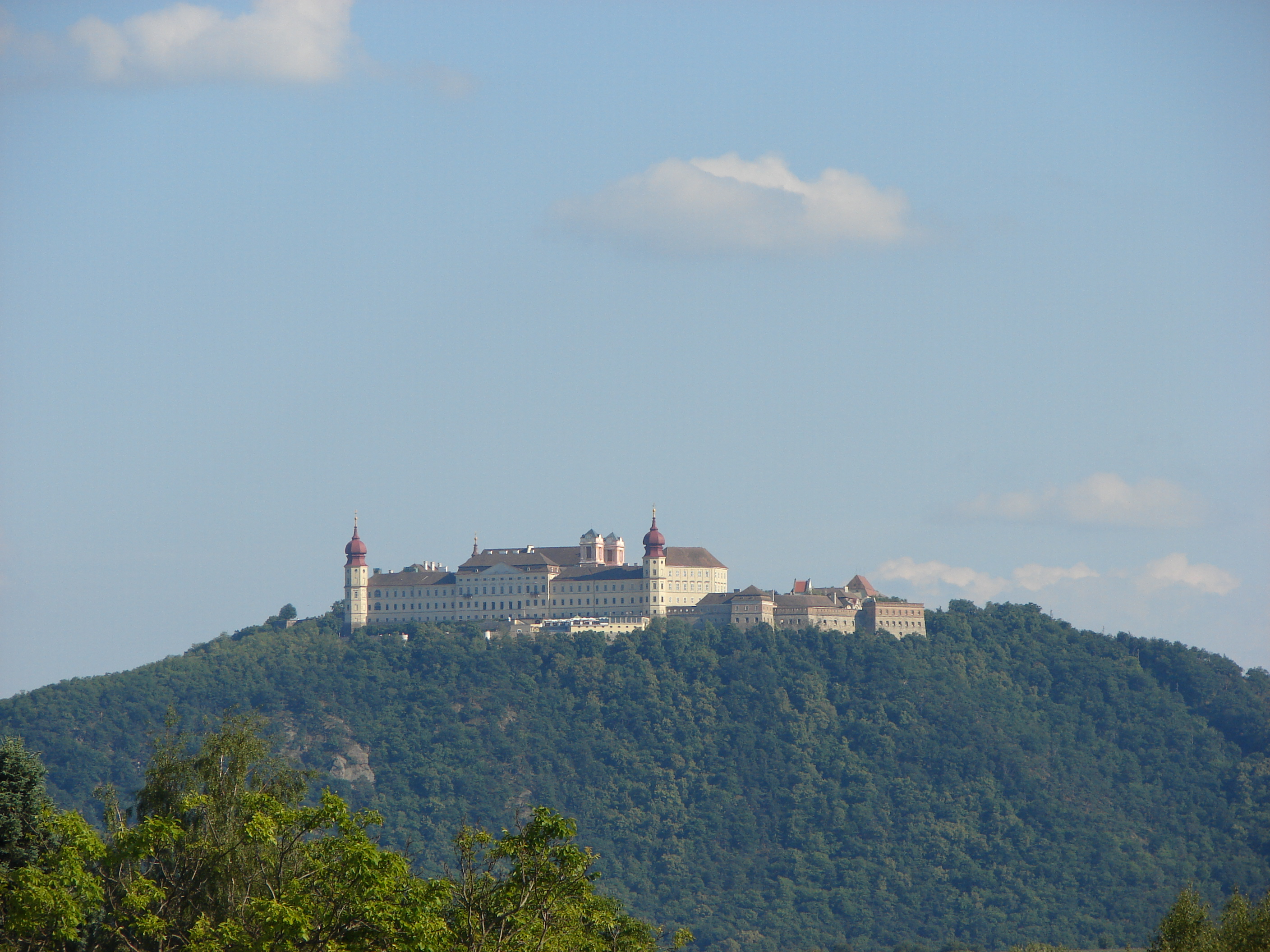 Stift Göttweig, Österreich. Blick von Nordwesten.